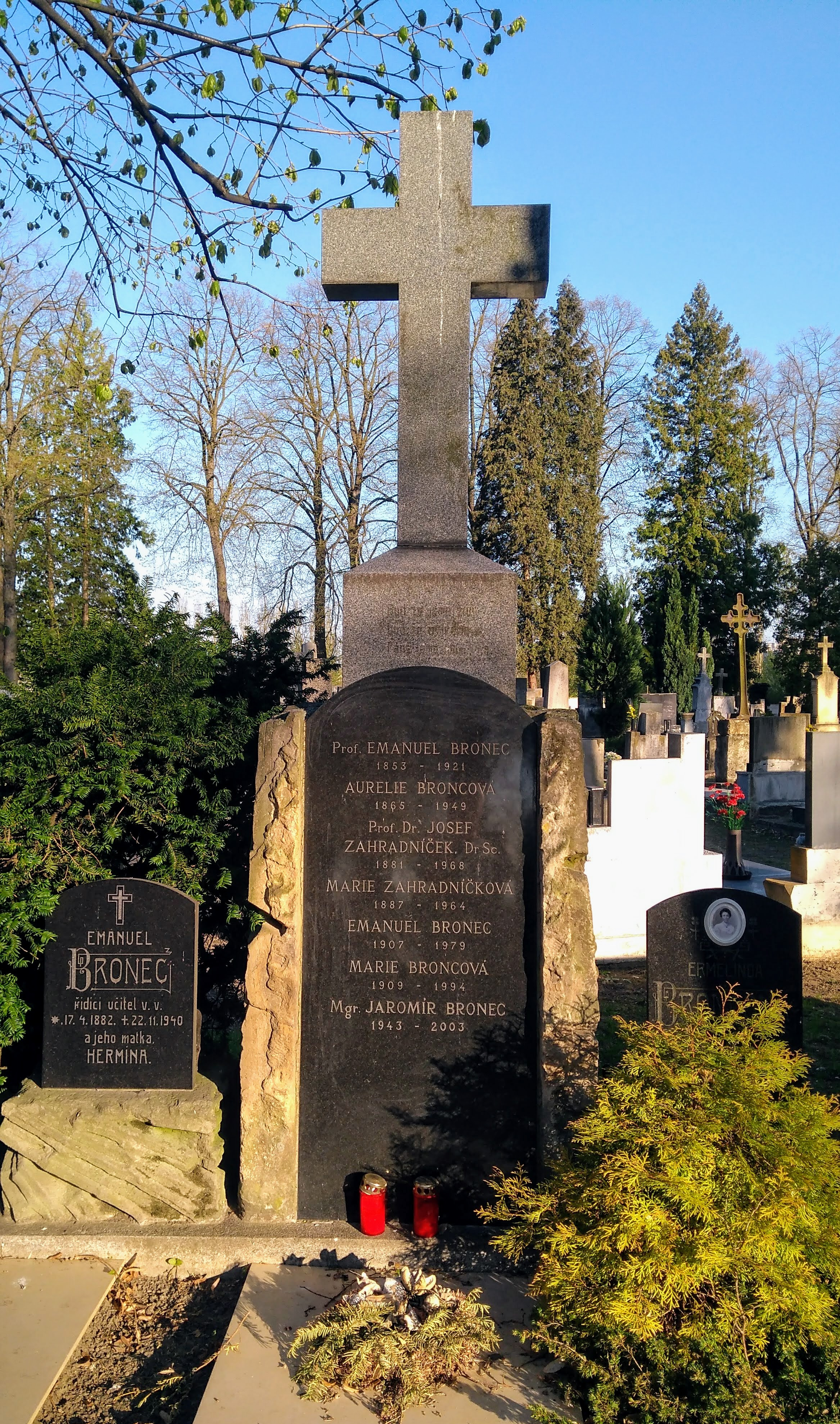 Prof. Dr. Zahradníček Josef DrSc. 9. 8. 1881, Třebíč – 12. 4. 1968, Brno, rodinná hrobka